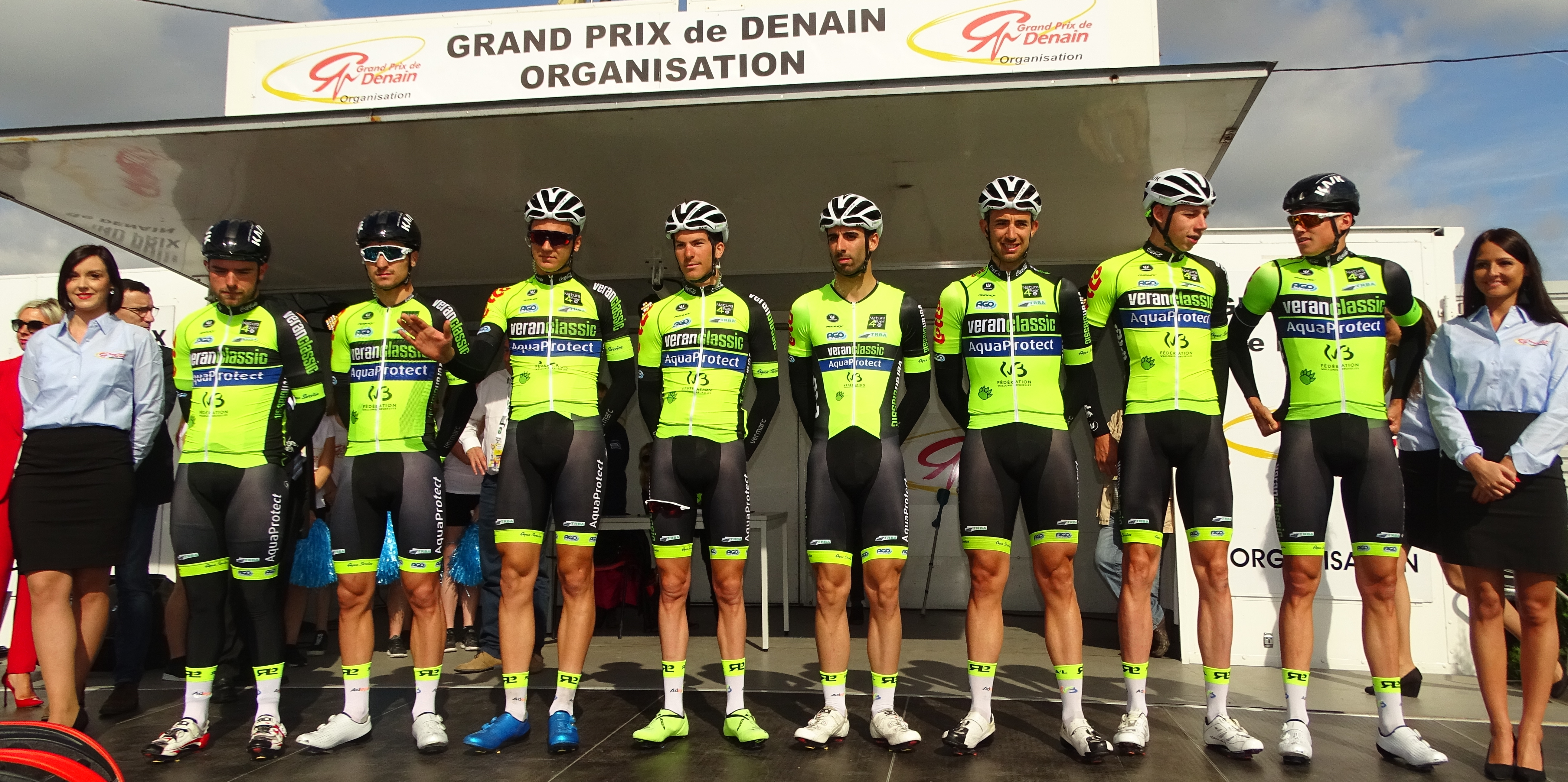 Reportage réalisé le jeudi 13 avril à l'occasion du départ et de l'arrivée du Grand Prix de Denain 2017 à Denain, Nord, Nord-Pas-de-Calais-Picardie, France.